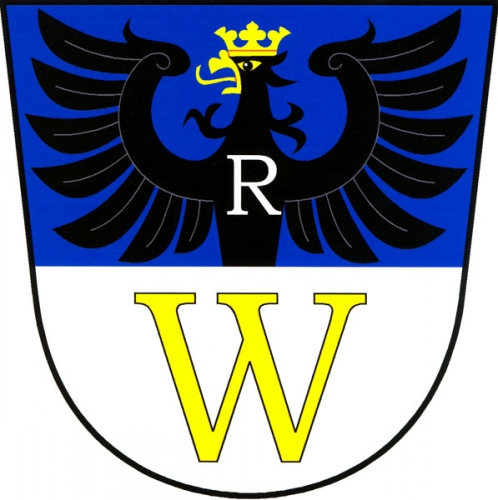 znak, Oleksovice, okres Znojmo